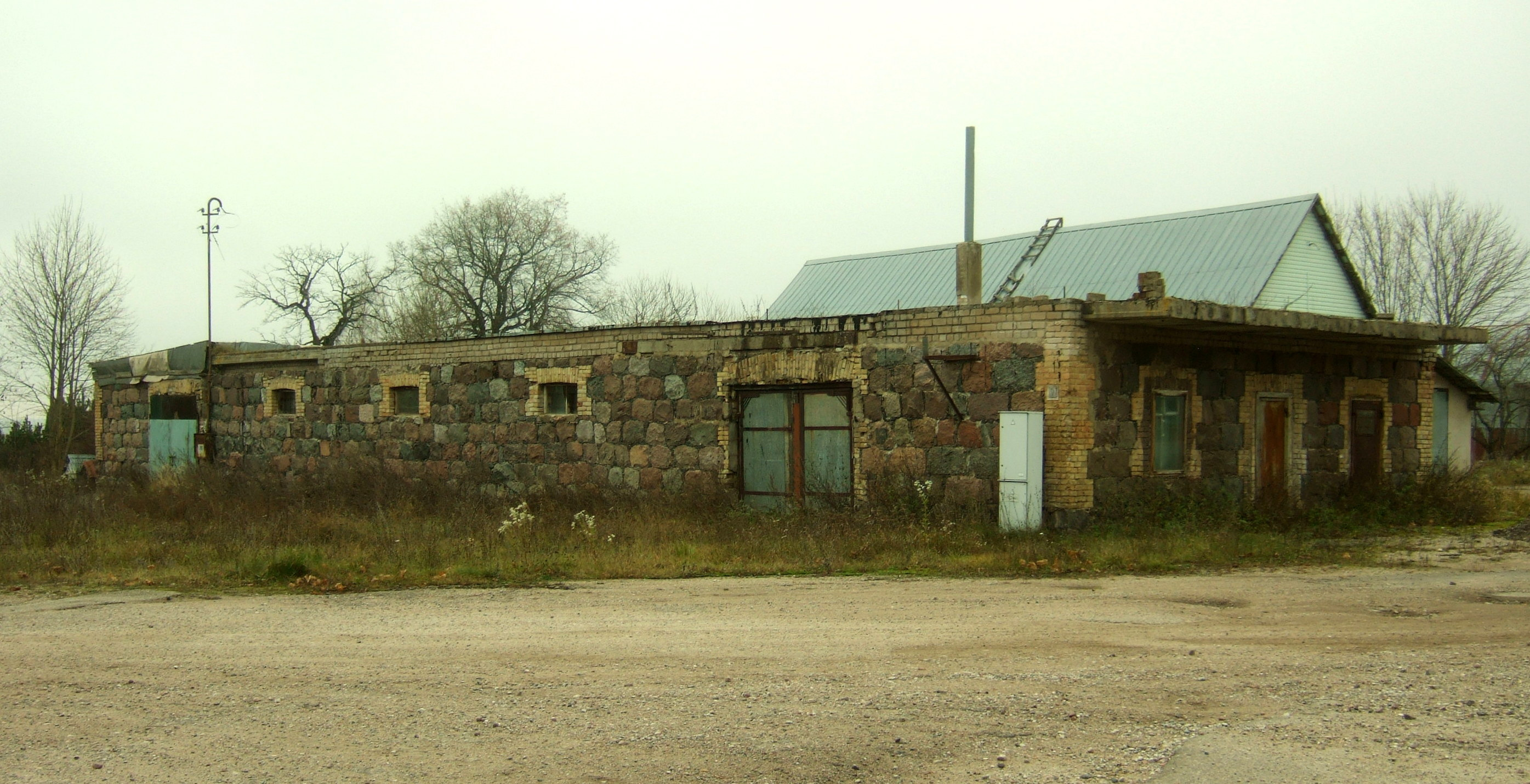 Maišiagalos dvaro arklidės